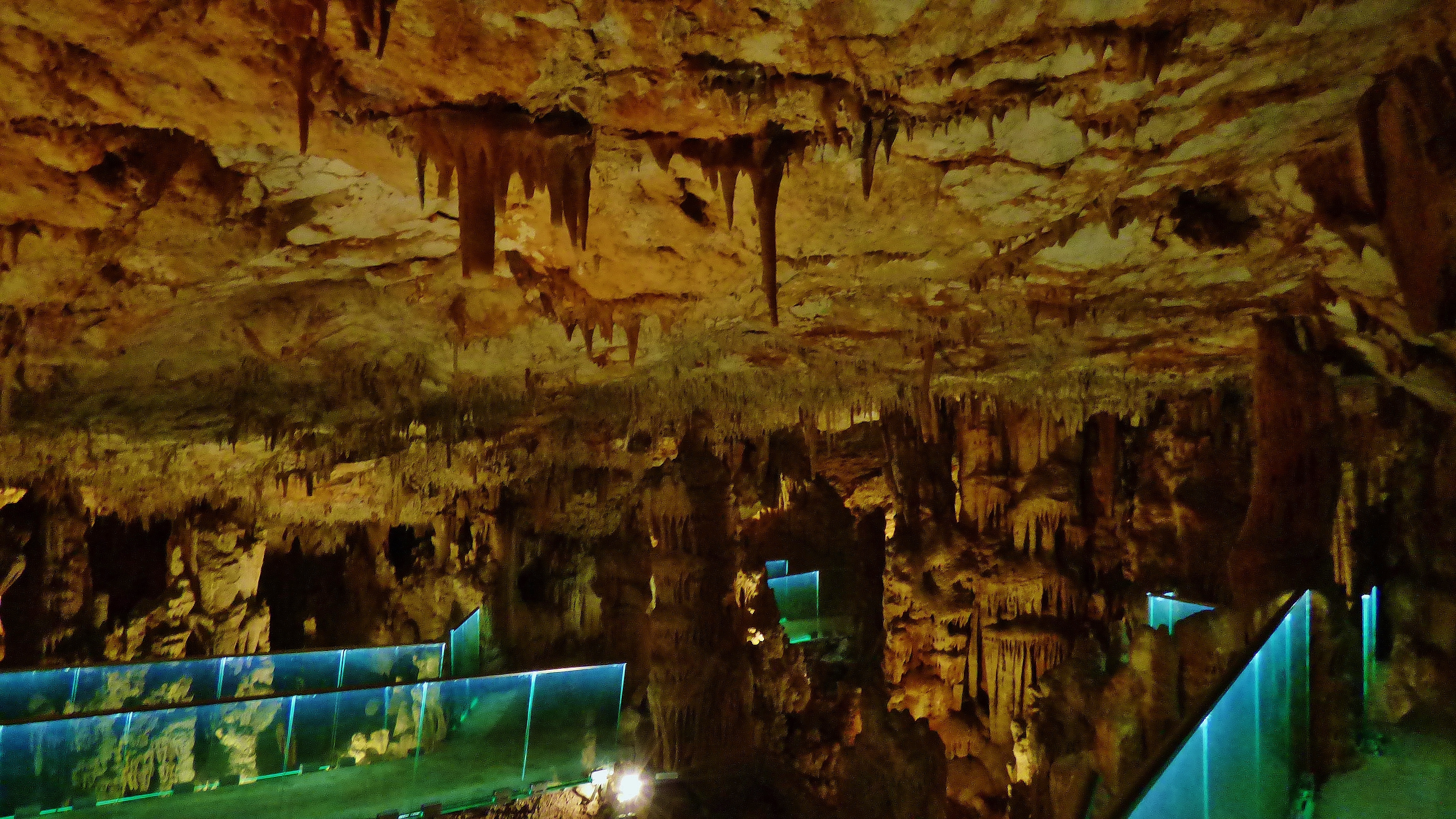 Vista della sala ricca di concrezioni presente all'interno delle Grotte di Montevicoli a Ceglie Messapica